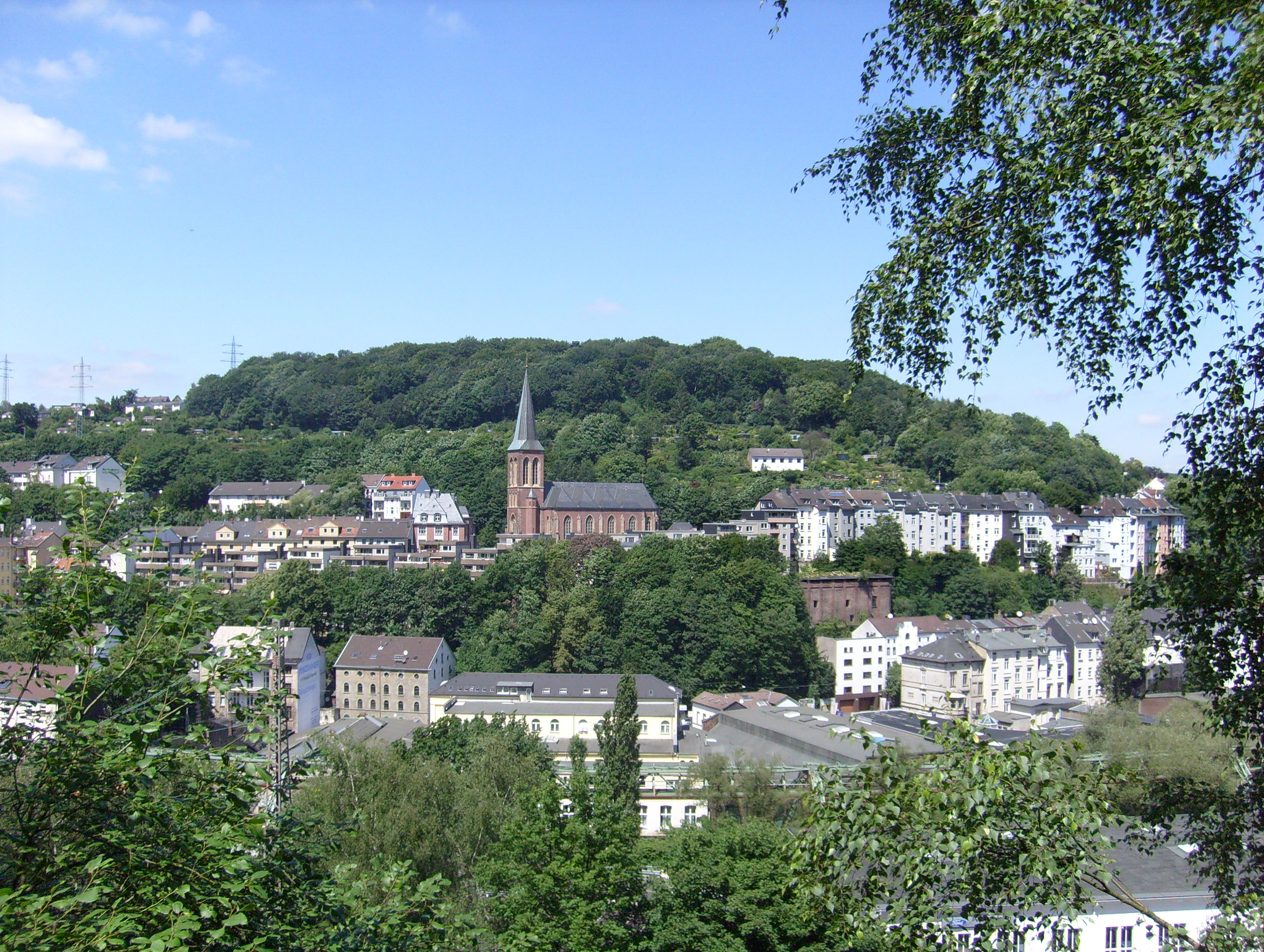 Kirche Sankt Joseph am Nützenberg in Wuppertal-Elberfeld